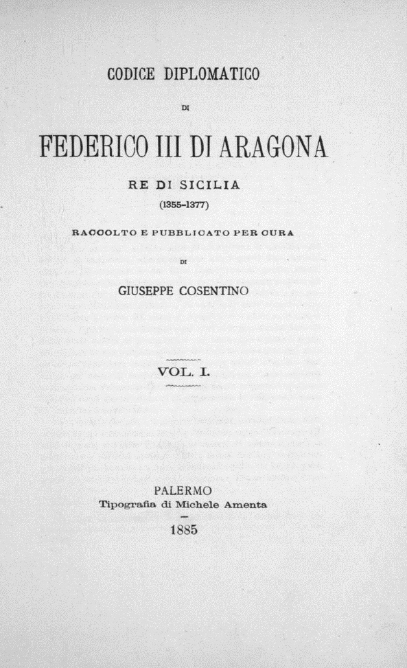 Frontespizio